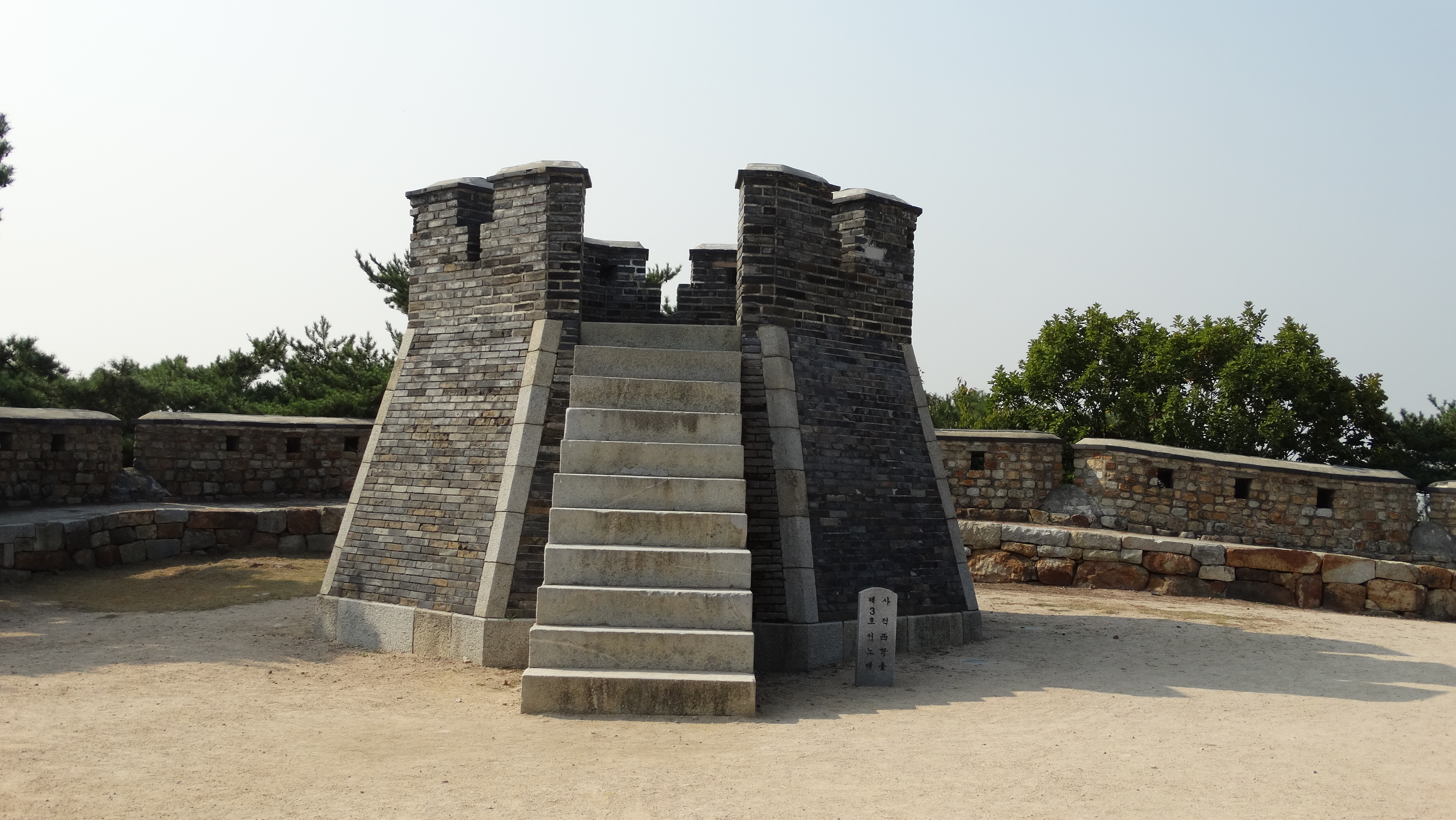 서노대 (2)